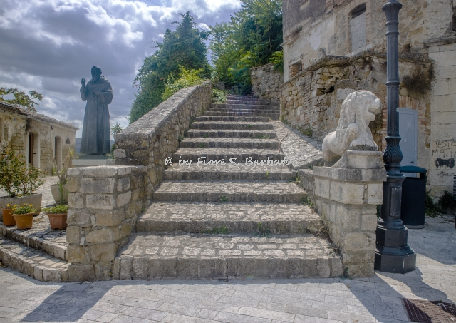 Dettagli di Sant'Arcengelo Trimonte (BN)